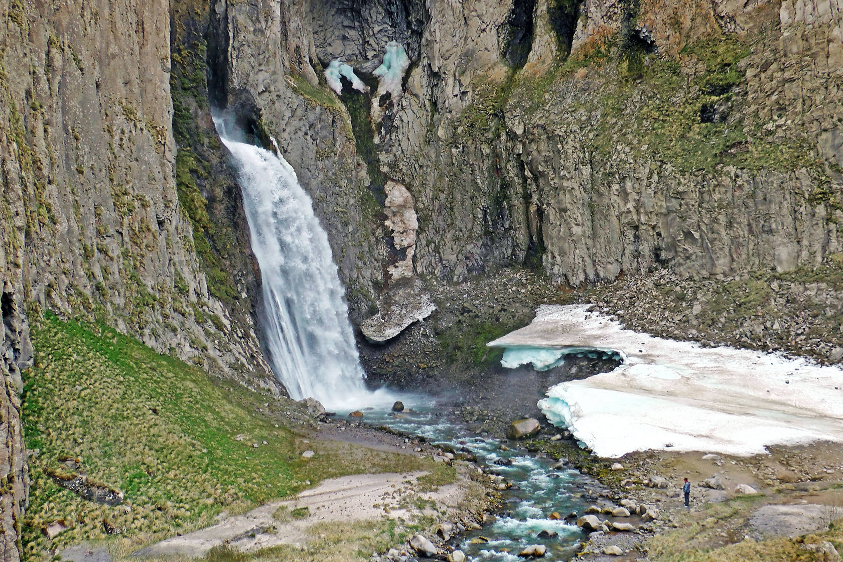 название водопада и фото